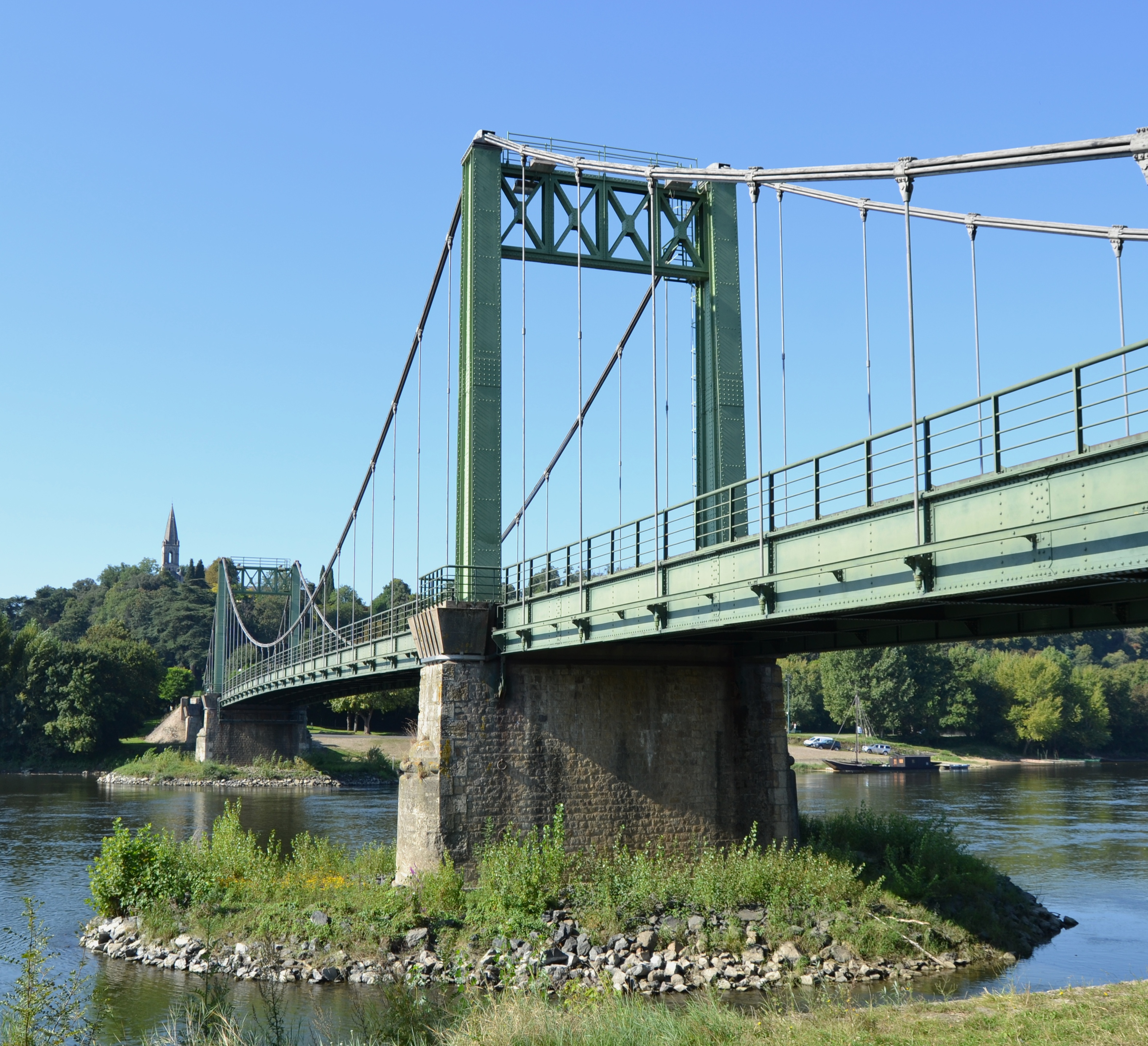 Pont de Gennes